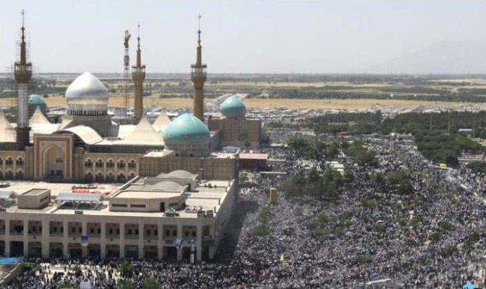 مرقد الإمام الخميني (رحمه الله)